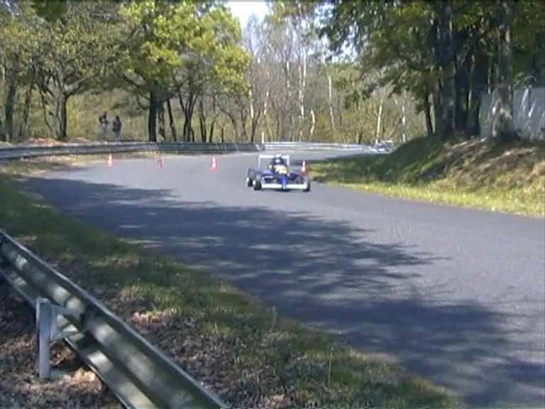 Stage de Formule Renault sur le circuit automobile de l'autodrome de Linas-Montlhéry